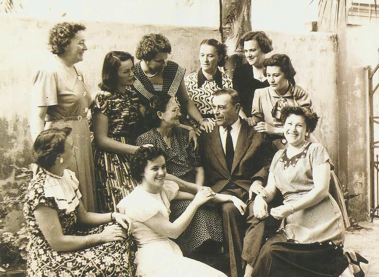 Érico Raabe com sua esposa Celestina Artico e suas filhas